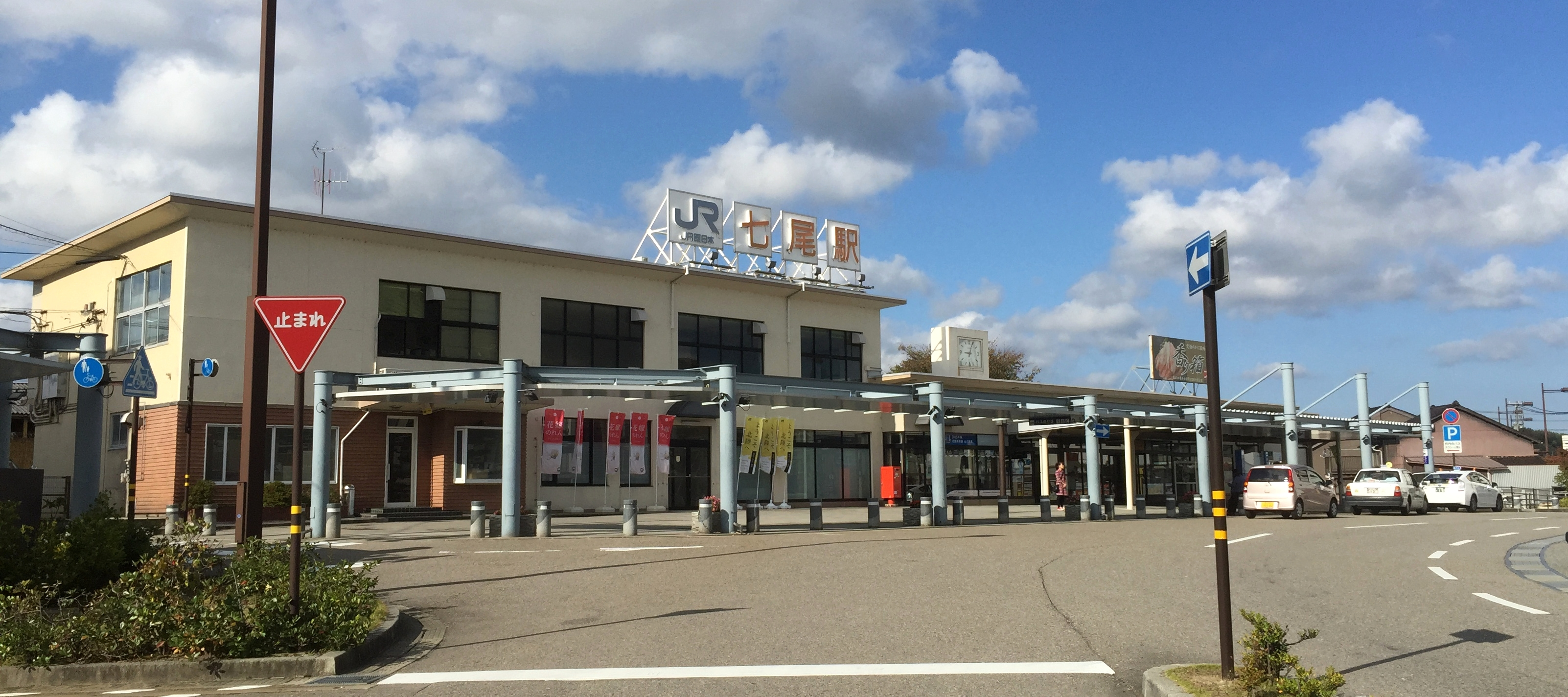 七尾駅駅舎